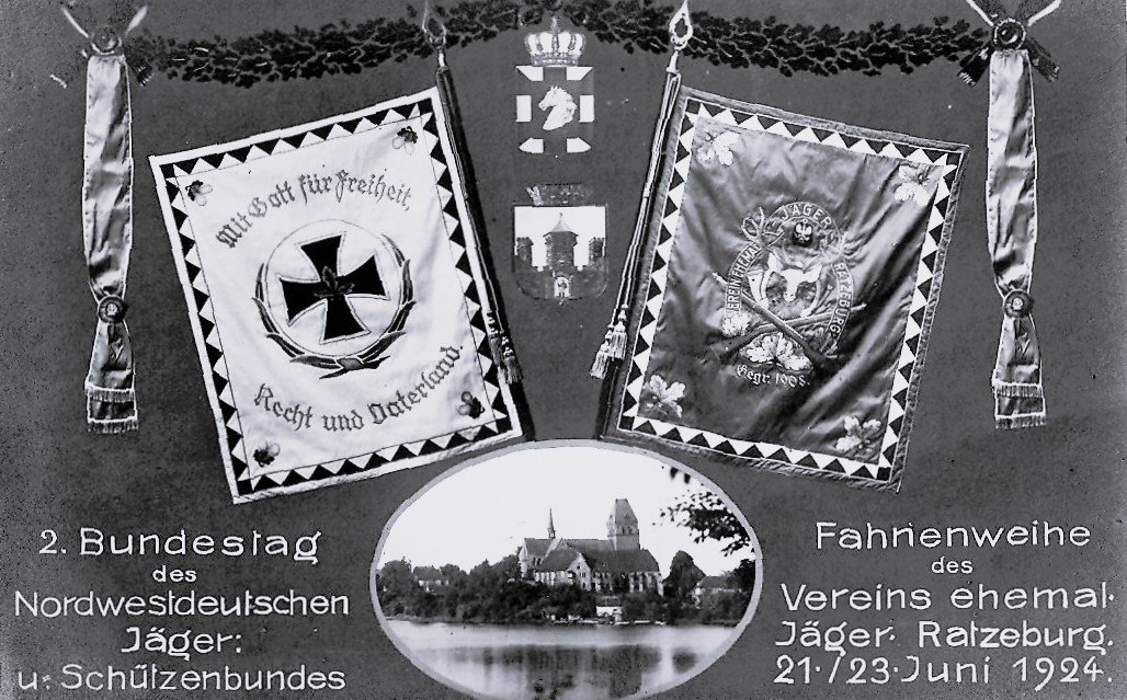 Jubiläumskarte zum 2. Jägertag nach dem Kriege